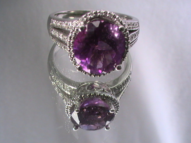 Amethyst